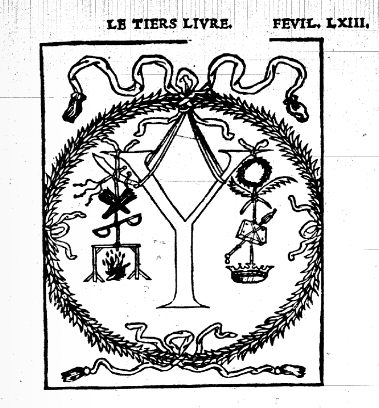 Lettre Y. Gravure du Champ Fleury de Geoffroy Tory (1529). Représentation "moralisée" de la "lettre pythagorique". La branche gauche de la lettre figure le chemin plus large de la Volupté (avec l'épée, le fouet, les verges, le gibet et le feu auxquels il mène) ; la branche droite, la voie plus étroite de la Vertu (avec ses récompenses : les lauriers, les palmes, le sceptre et la couronne).